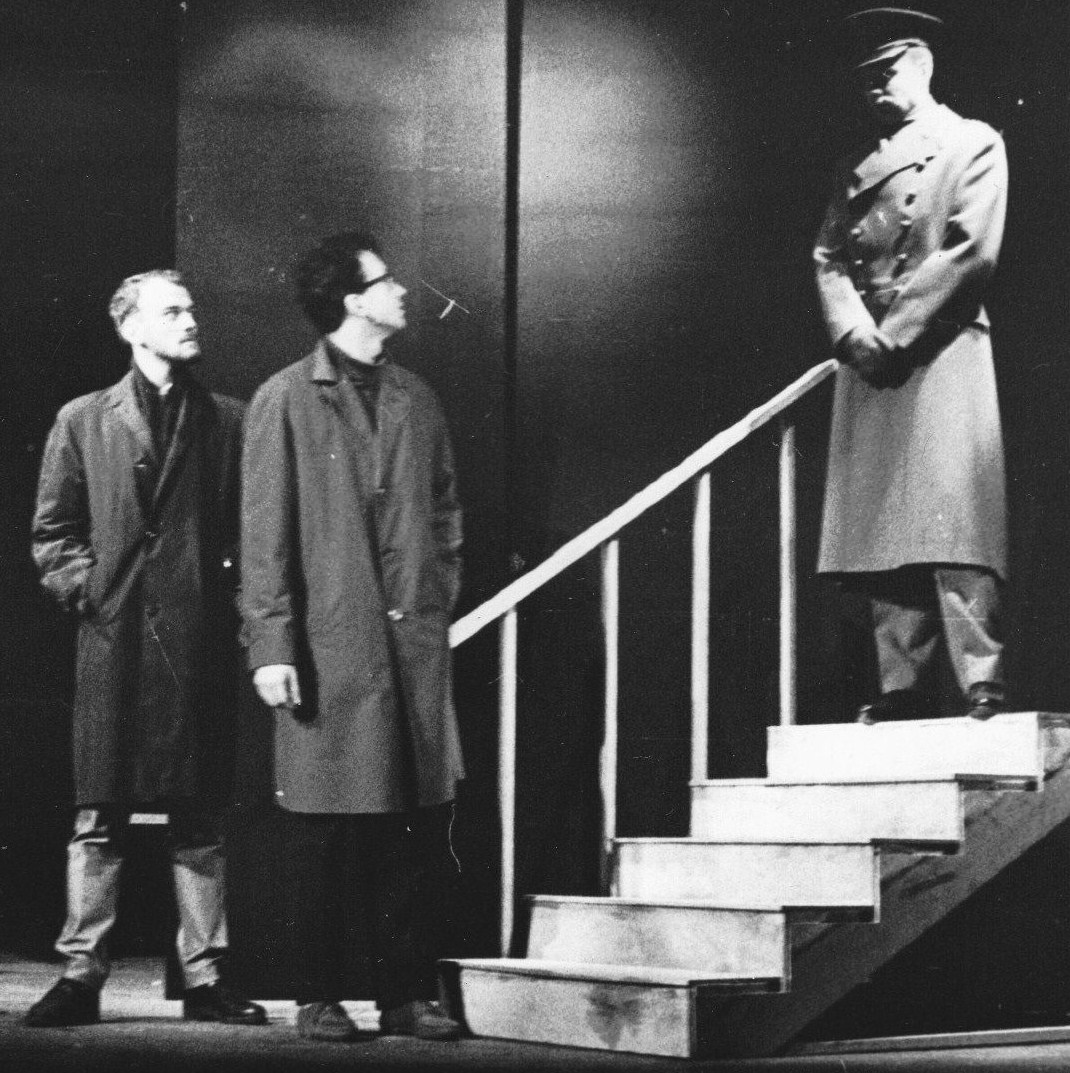 Studieteatern 1963